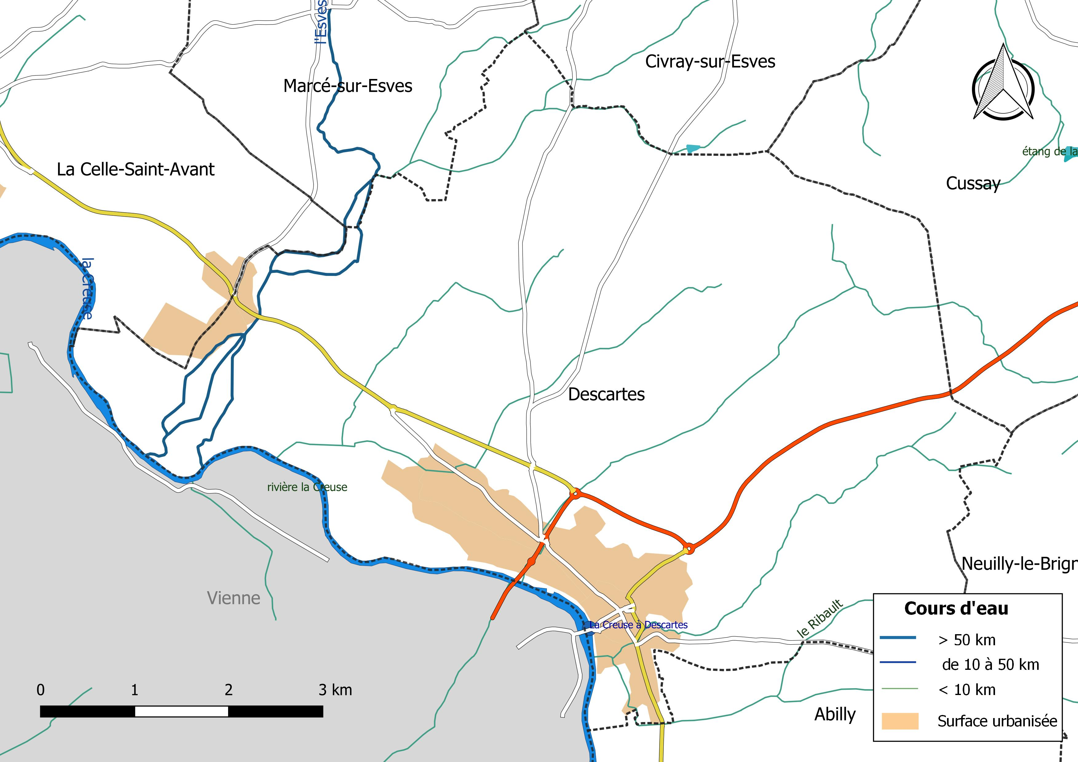 Carte du réseau hydrographique de la commune de Descartes (Indre-et-Loire) (France).